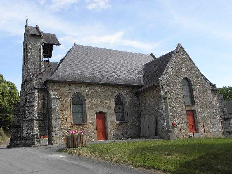 Église Saint-Aubert à La Chapelle-Saint-Aubert (Ille-et-Vilaine).